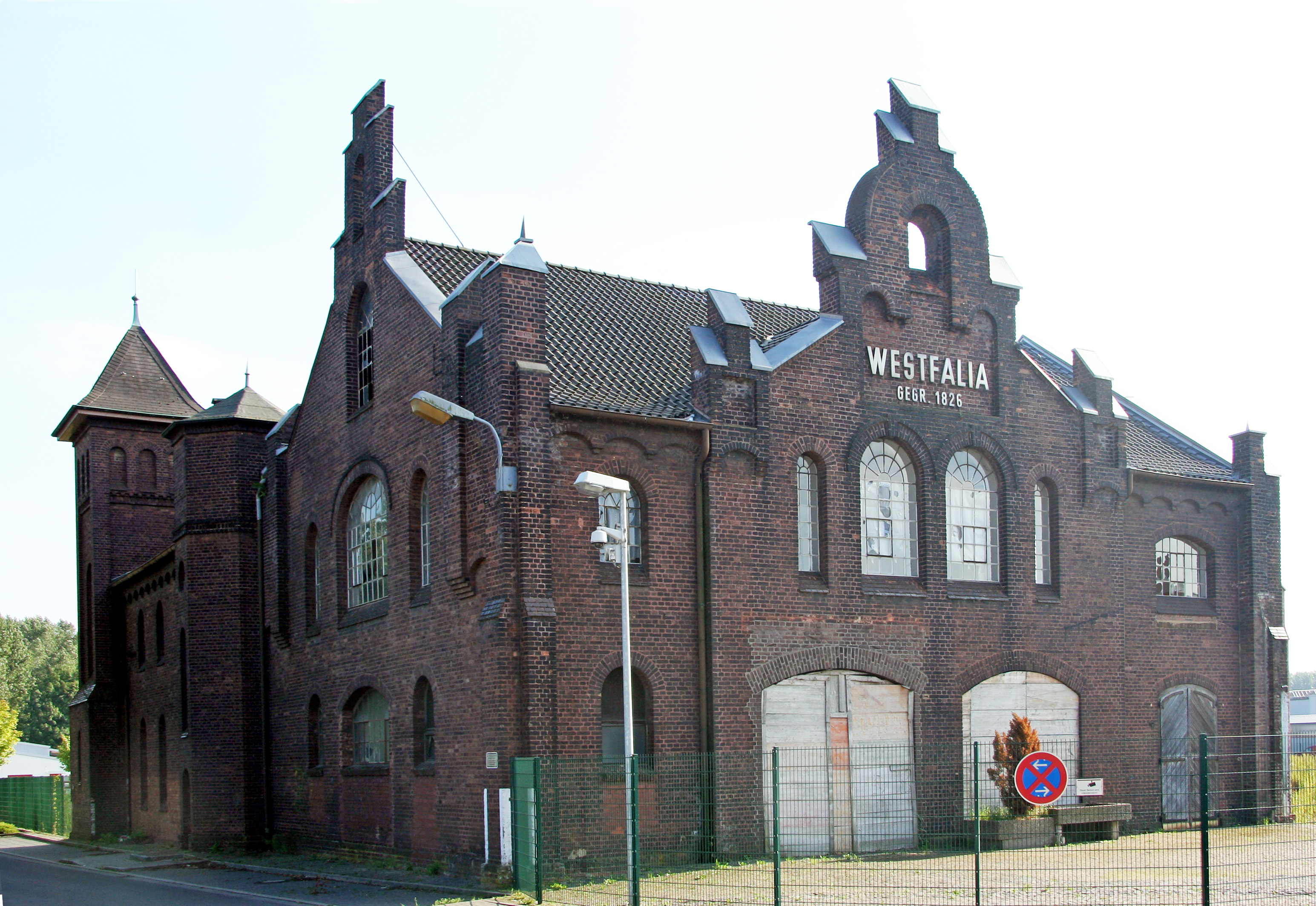 Das Kantinengebäude ist das letzte erhaltene Gebäude der ehemaligen Eisenhütte Westfalia in Lünen Wethmar. Im September 2012 zeigt sich das Gebäude in einem bedauernswerten Zustand.This is a photograph of an architectural monument., no. 105